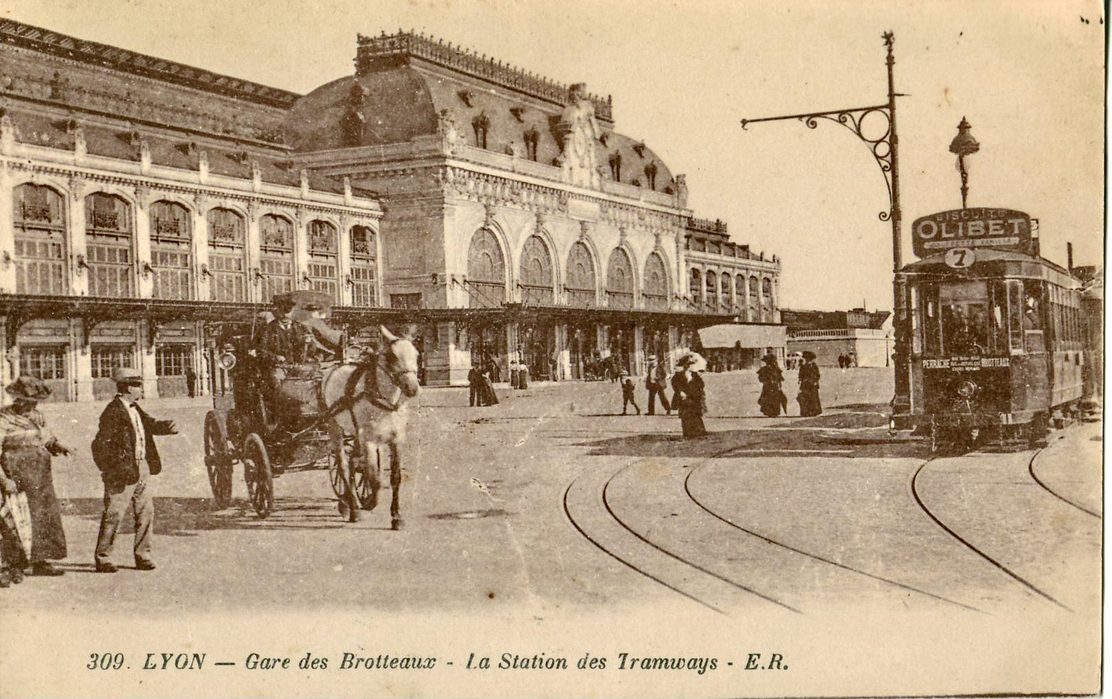 Carte postale ancienne éditée par ER, n°309 LYON - Gare des Brotteaux - La Station des Tramways